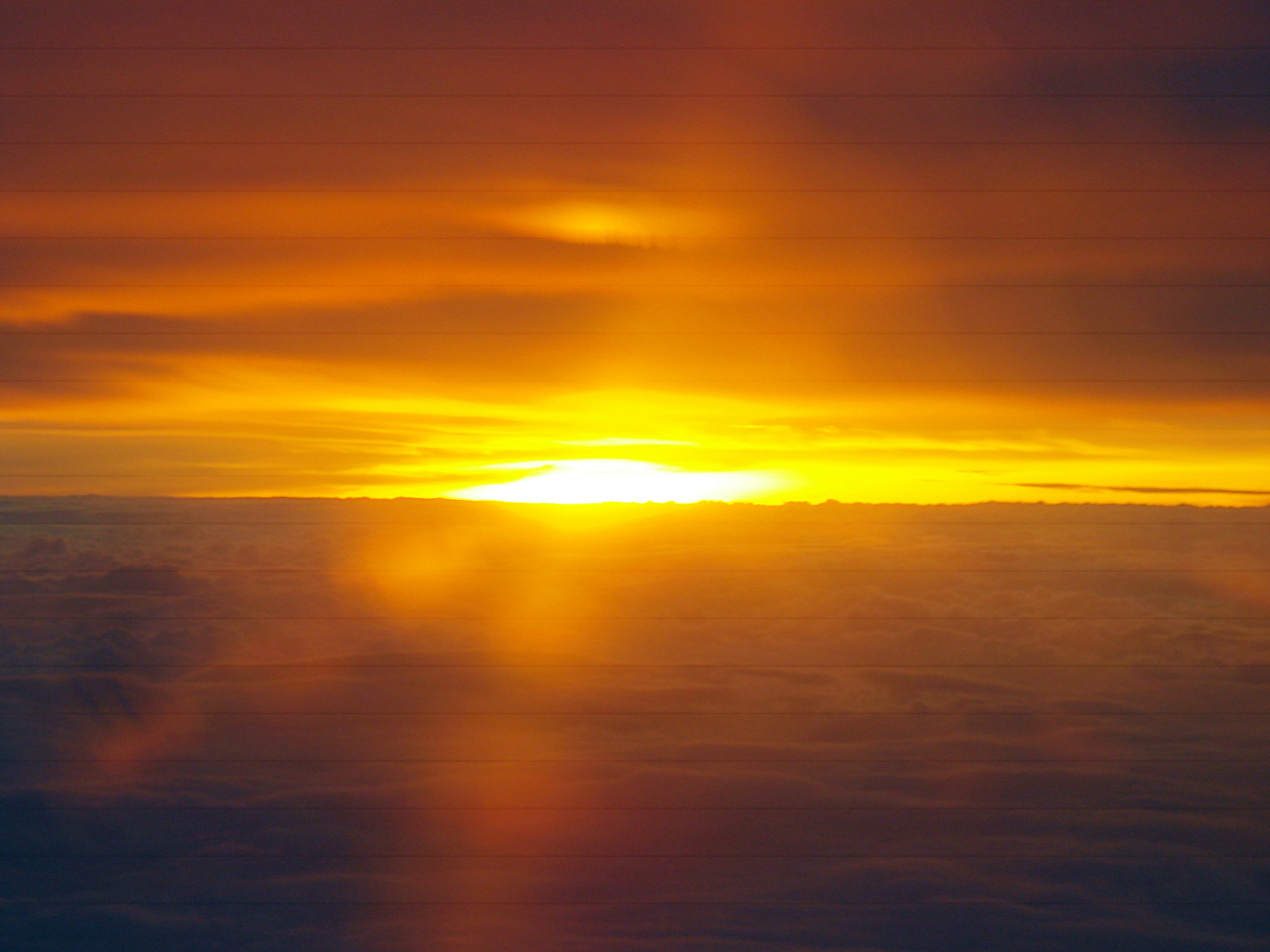 horizone sunset